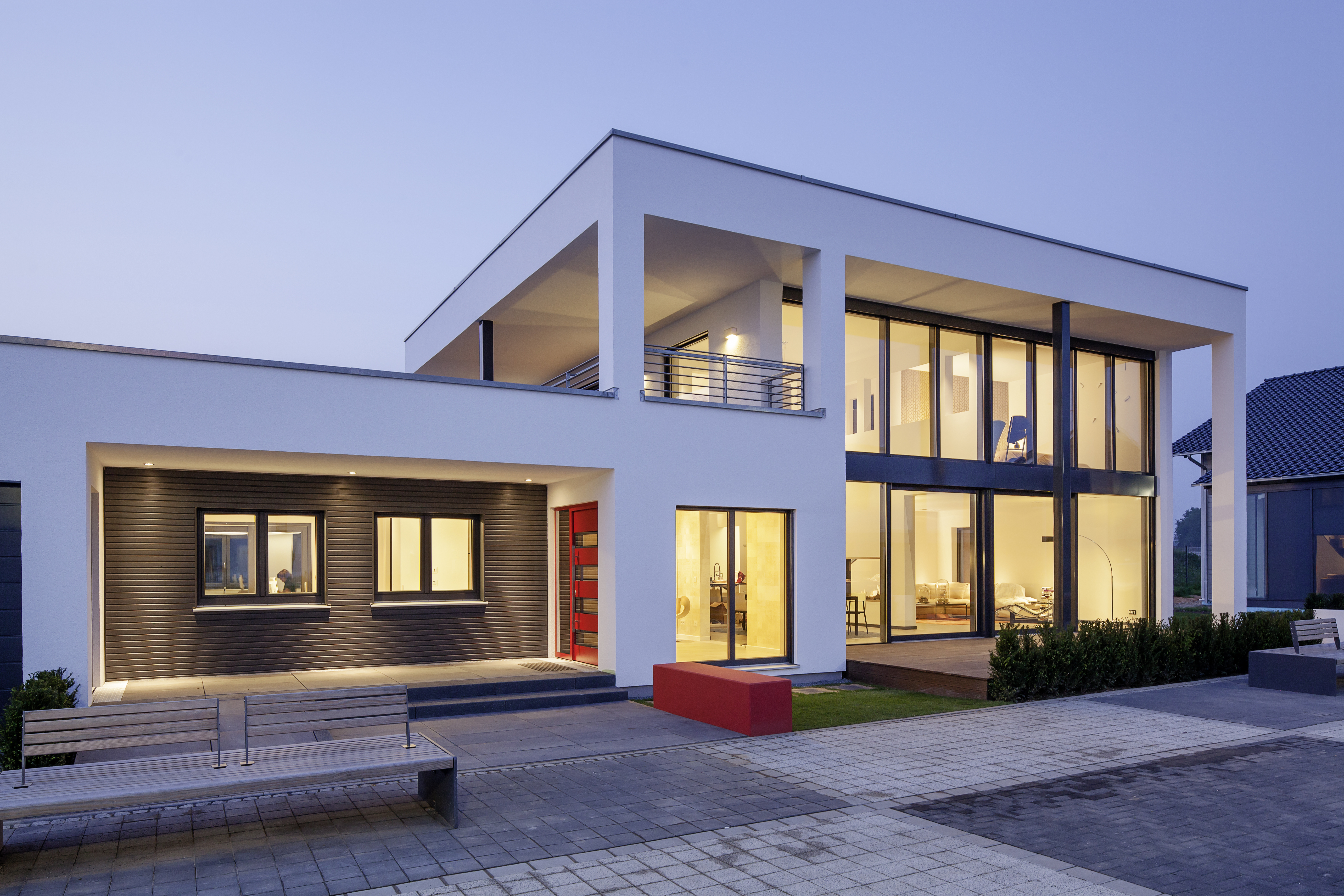 Musterhaus in Frechen, Dritter Platz beim Deutschen Traumhauspreis 2013